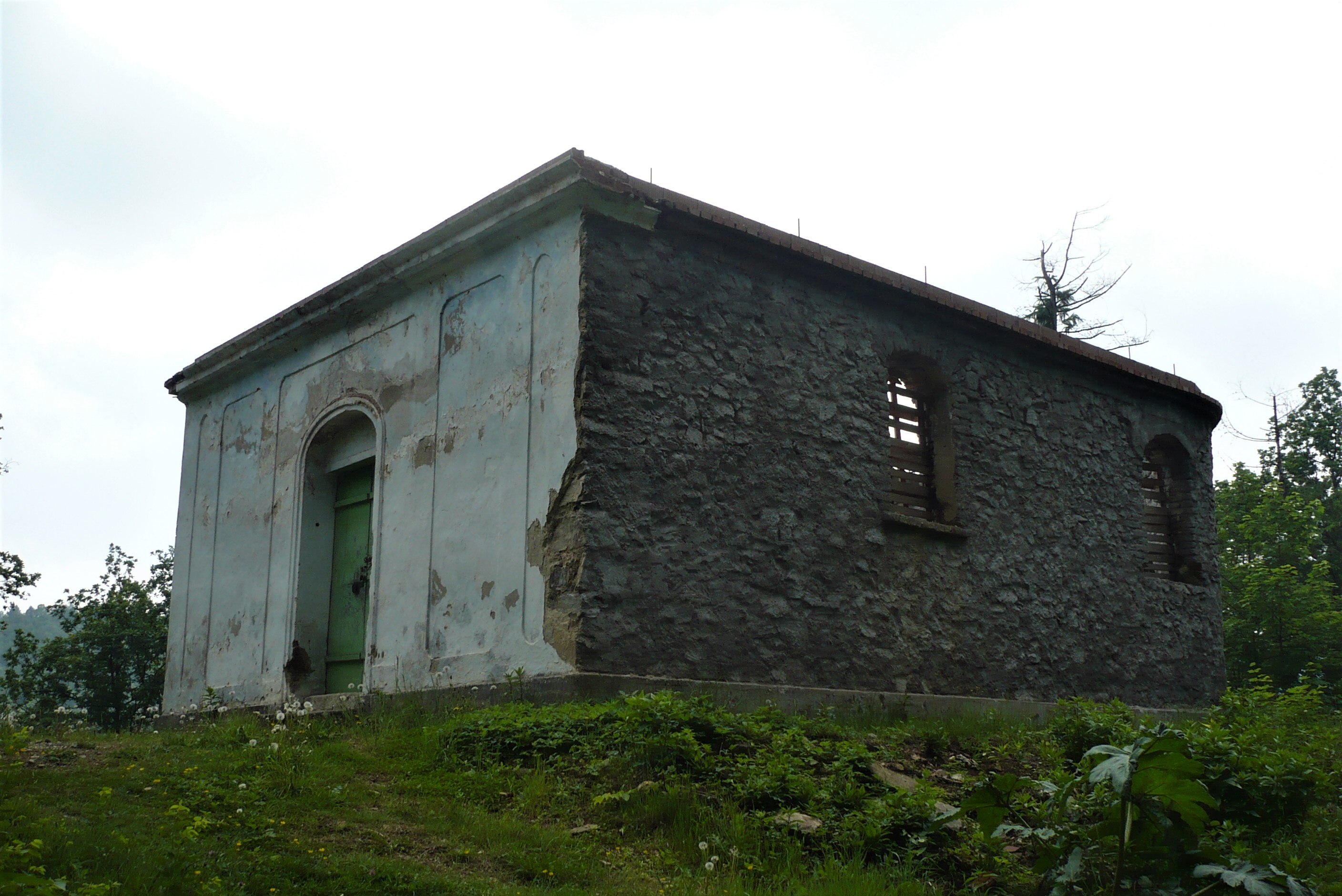 Złoty Stok